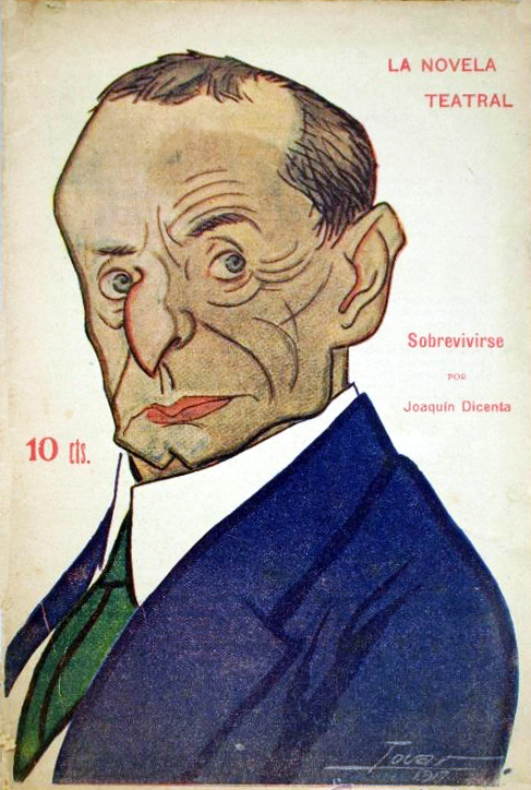 Caricatura de Joaquín Dicenta.